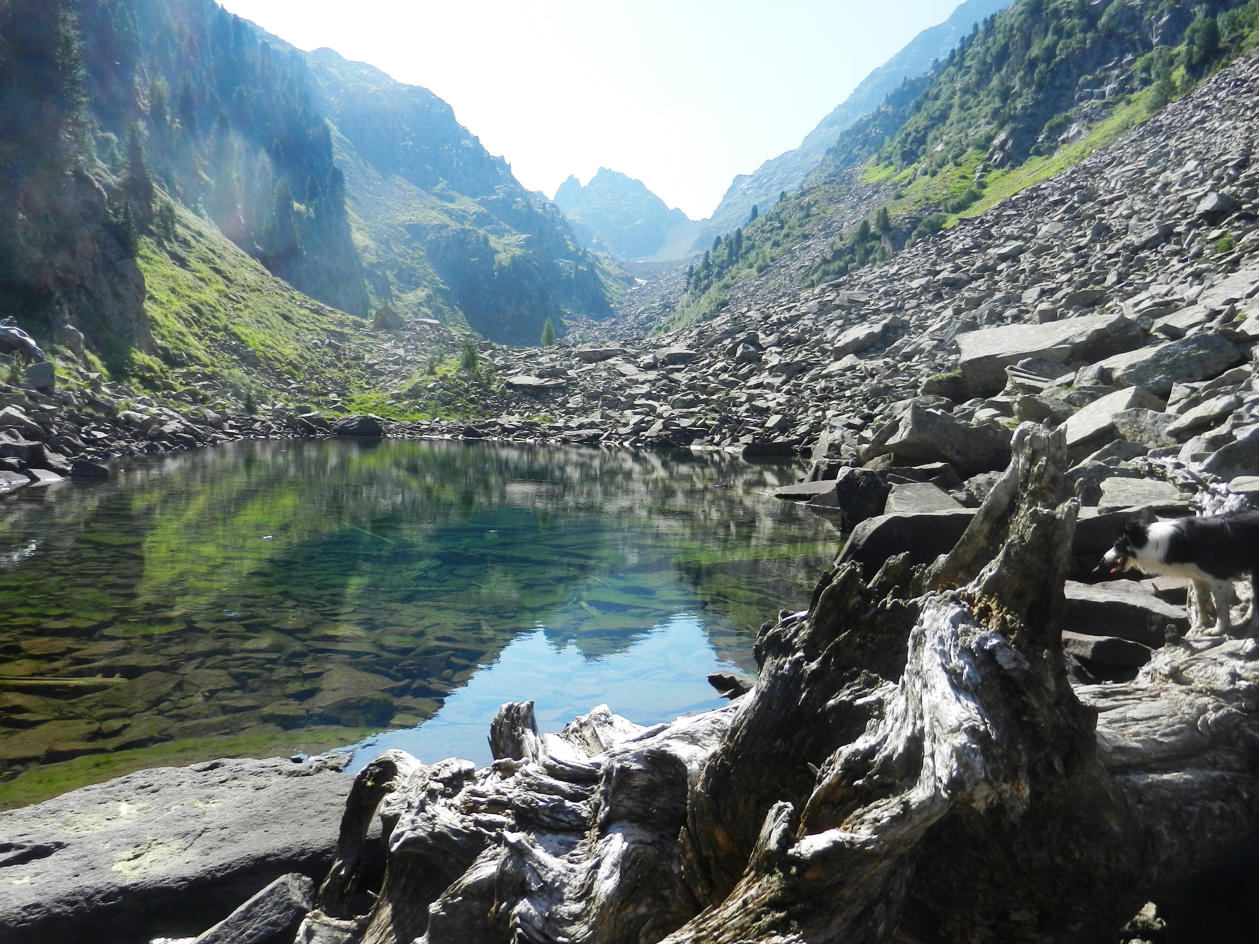 il cristallino lago della Caserina